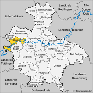 Sinmarignen